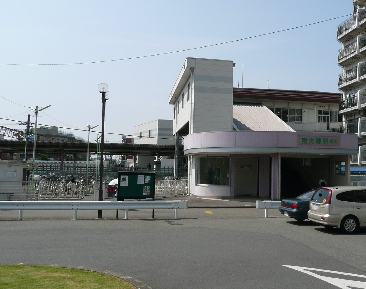 南大塚駅北口